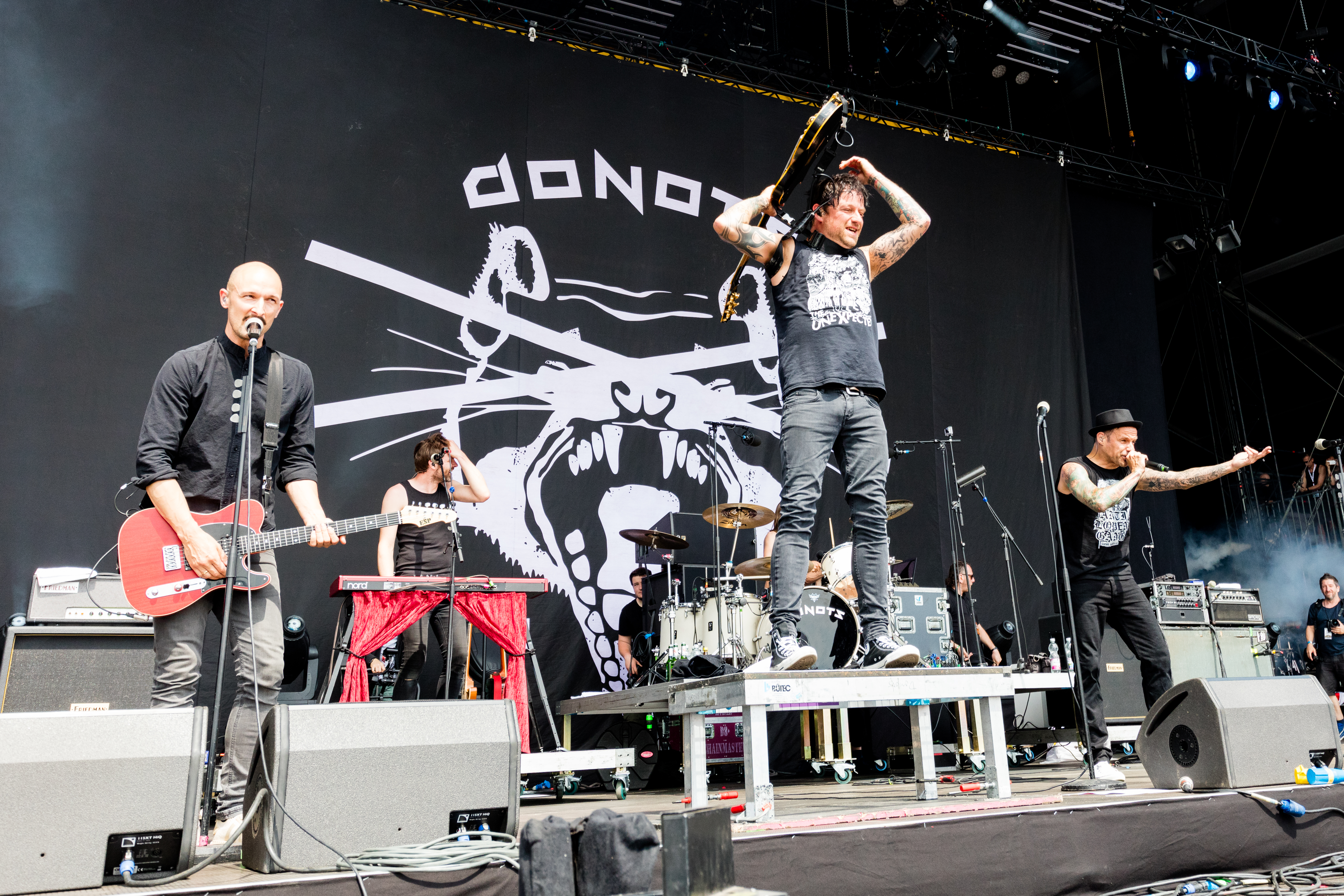 Donots during Rock am Ring at Nürburgring, Nürburg, Rheinland Pfalz, Germany on 2017-06-03, Photo: Sven Mandel